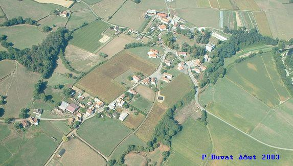 Photo aérienne d'Espiute